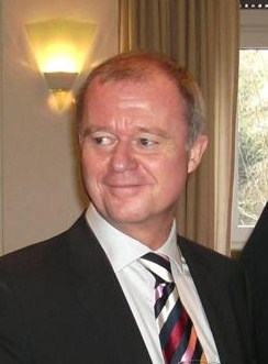 Thomas Kleist